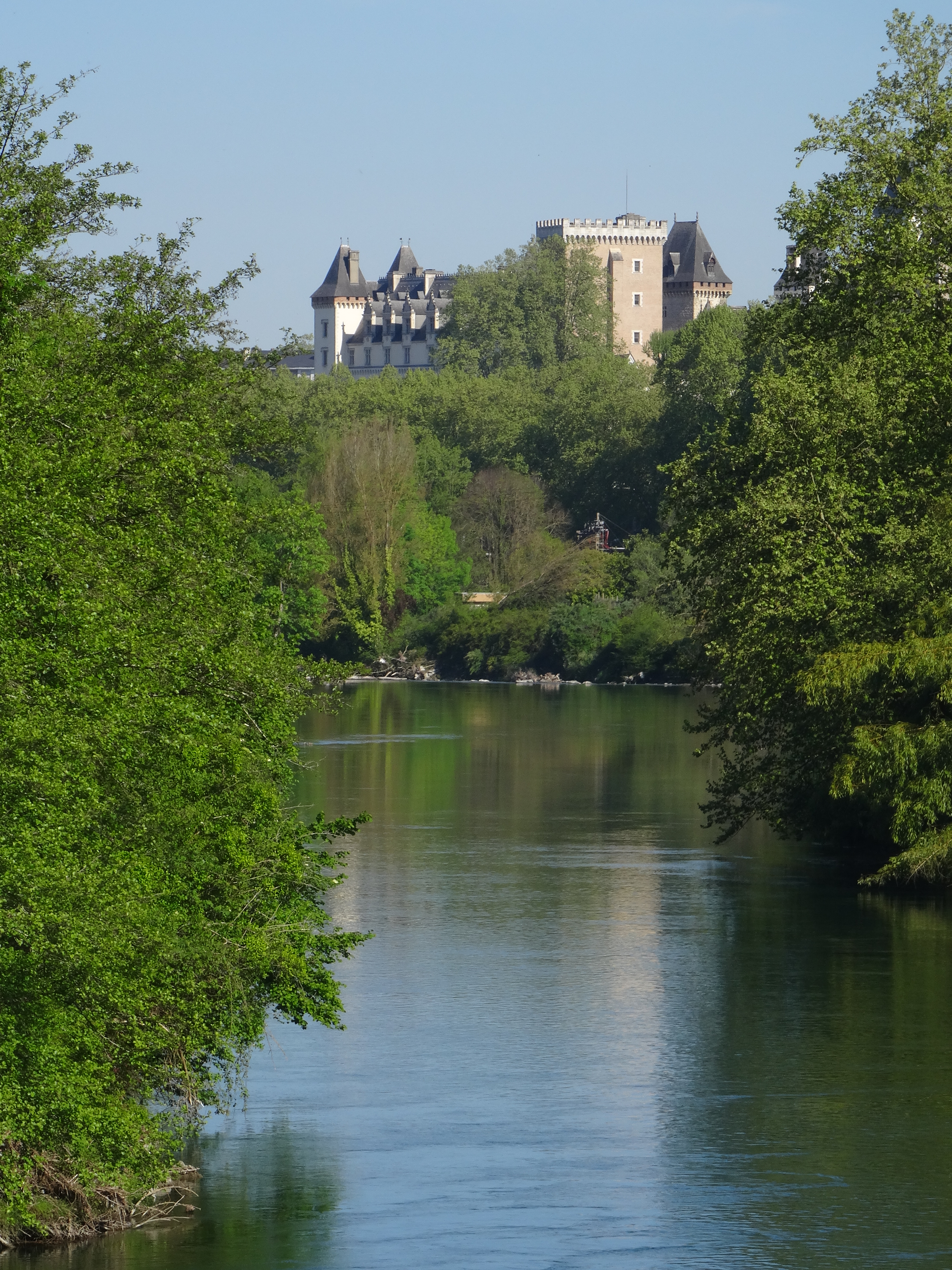 Vue sur le château de Pau depuis le gave, photo prise sur la passerelle de Gelos